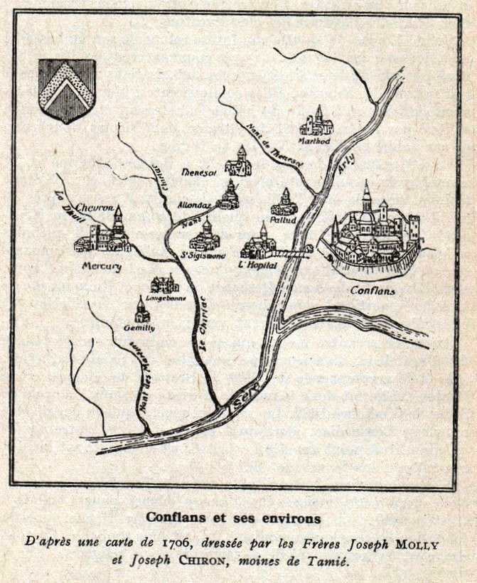 Carte ancienne de Conflans